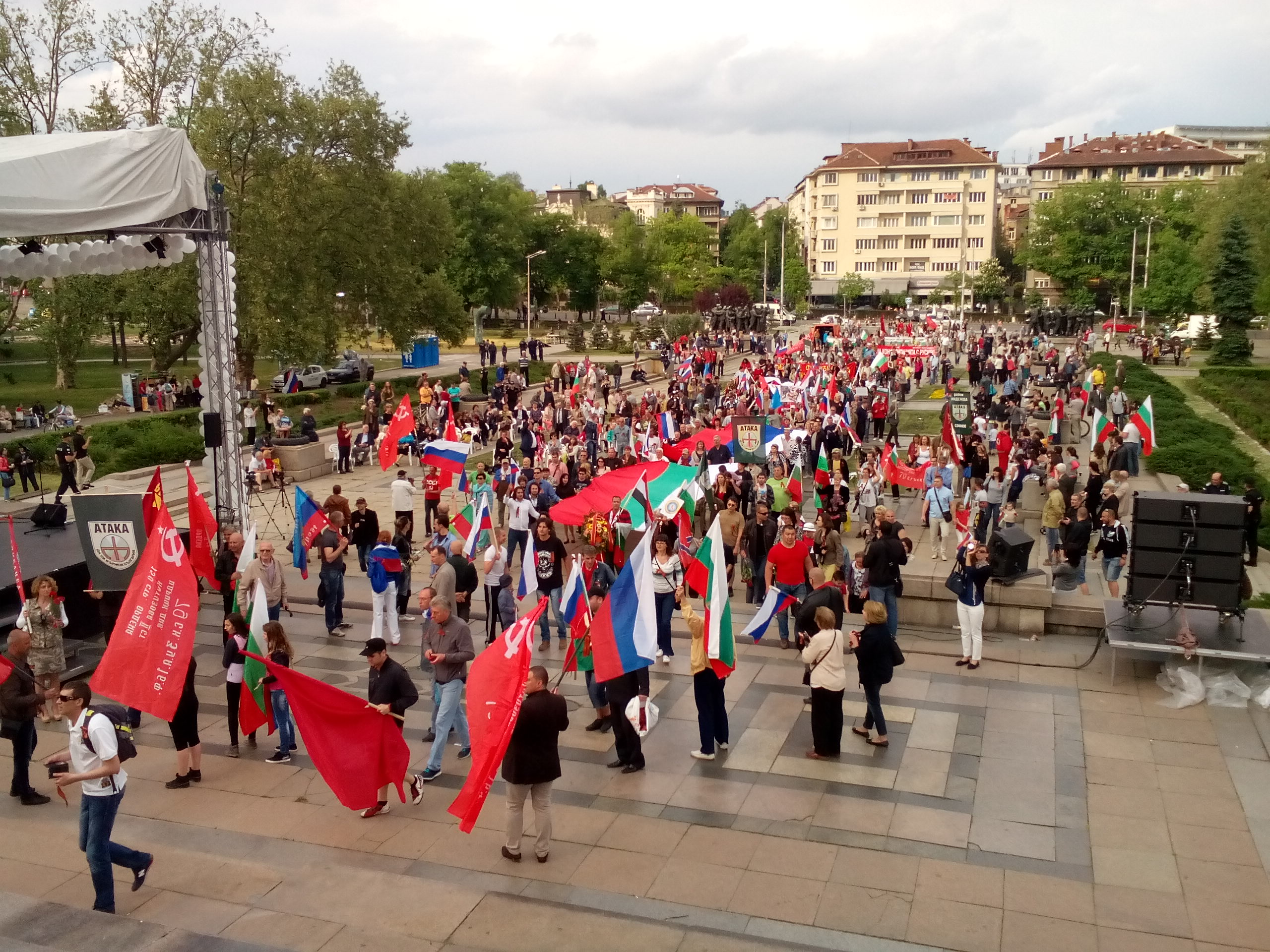 Българският народ поднася цветя и венци на Паметника на Съветската армия в София по случай Деня на победата над фашизма.